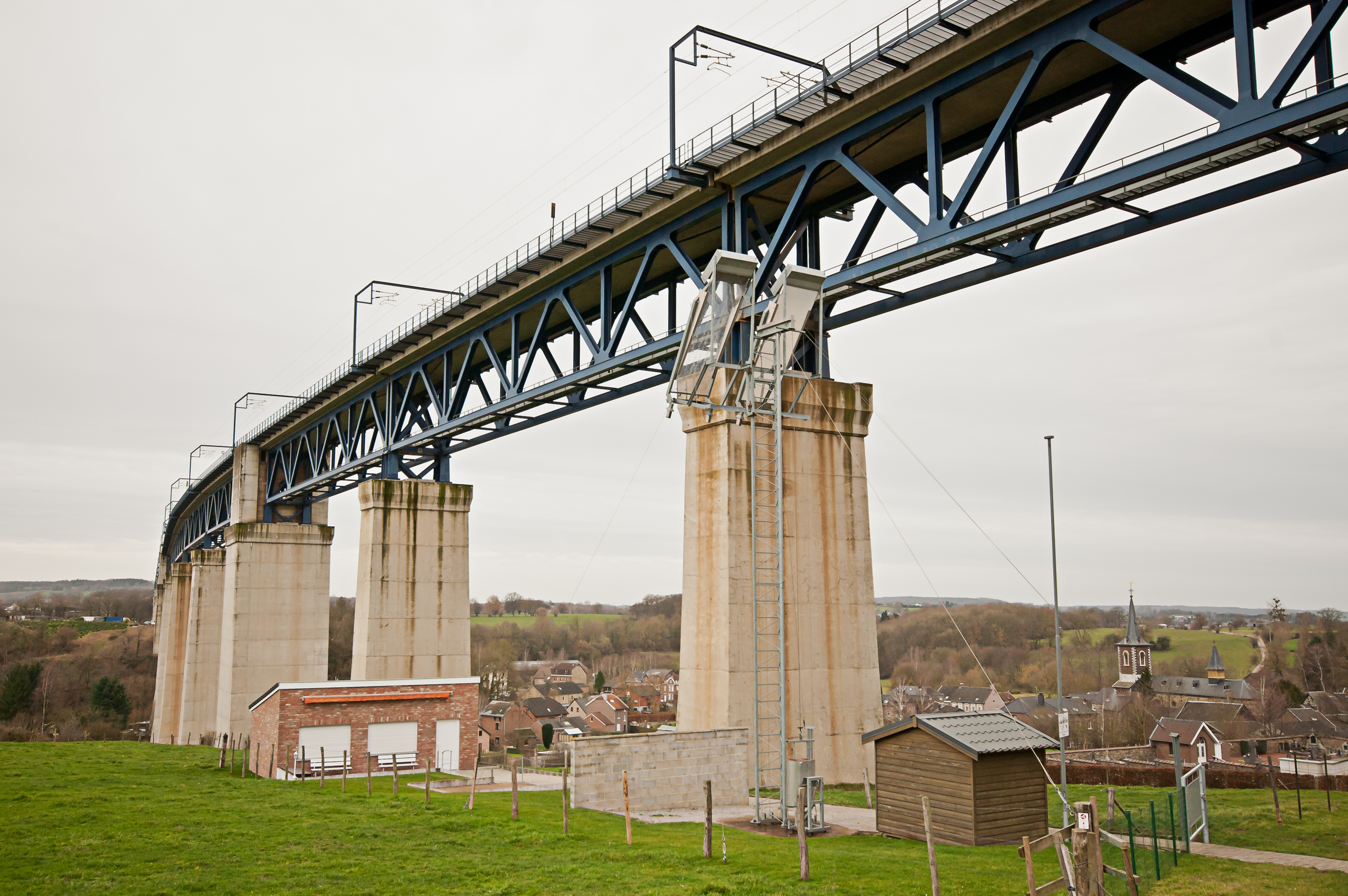 Ansicht des Göhltalviaduktes aus südöstlicher Richtung von der Rue de Viaduct in Moresnet aus